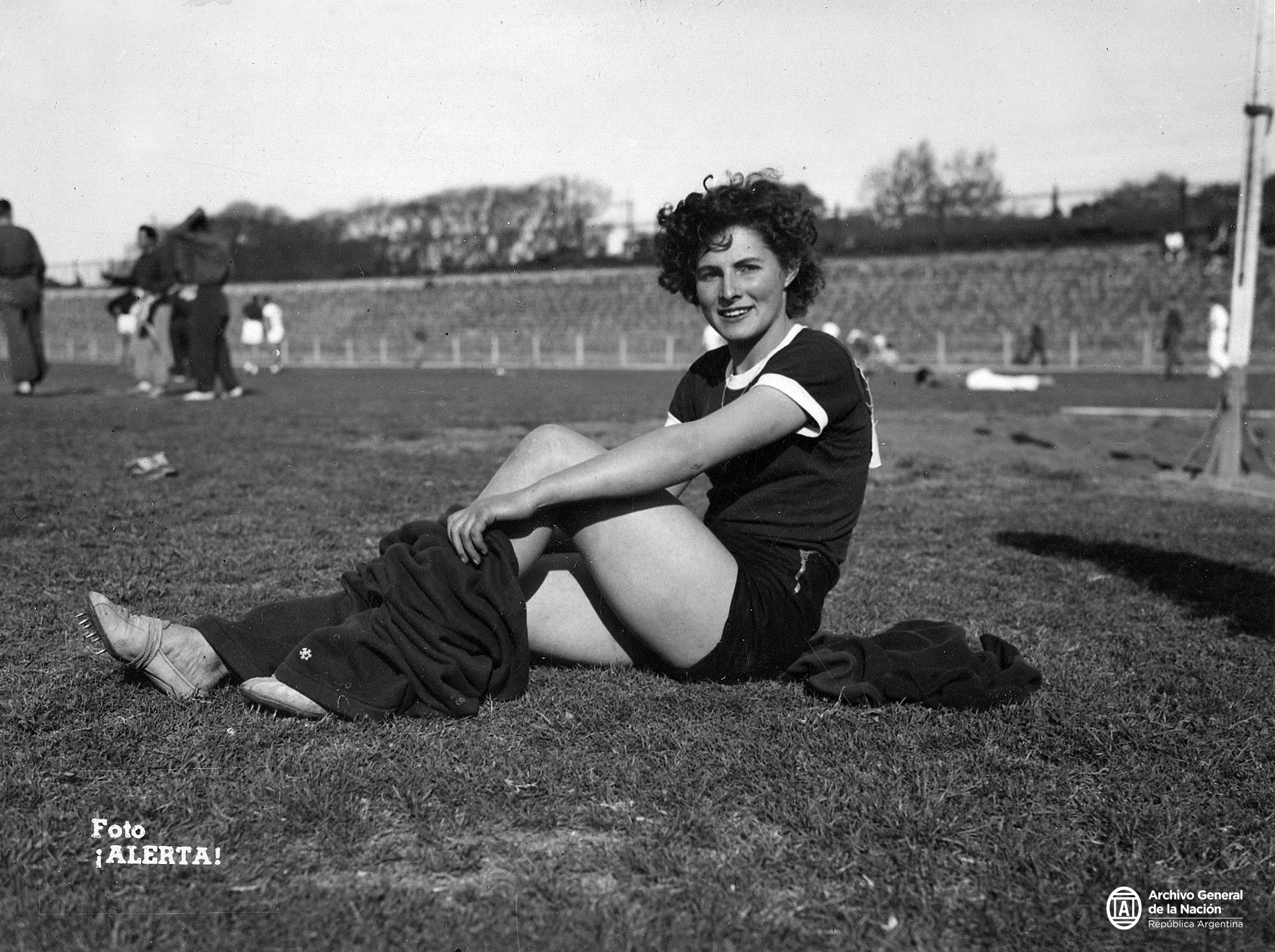 Noemí Simonetto, primera medallista olímpica en la historia del atletismo argentino, septiembre de 1942.